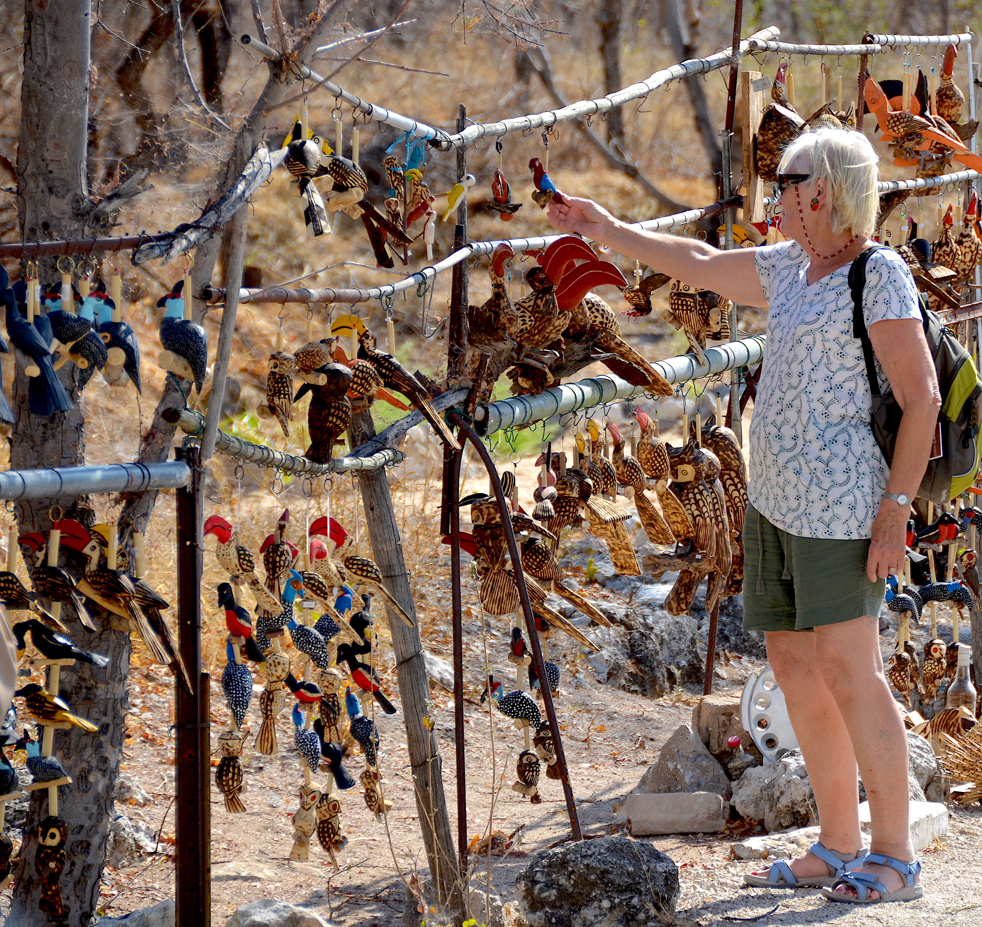 Einheimische Handarbeiten im Etosha-Nationalpark (Namibia)